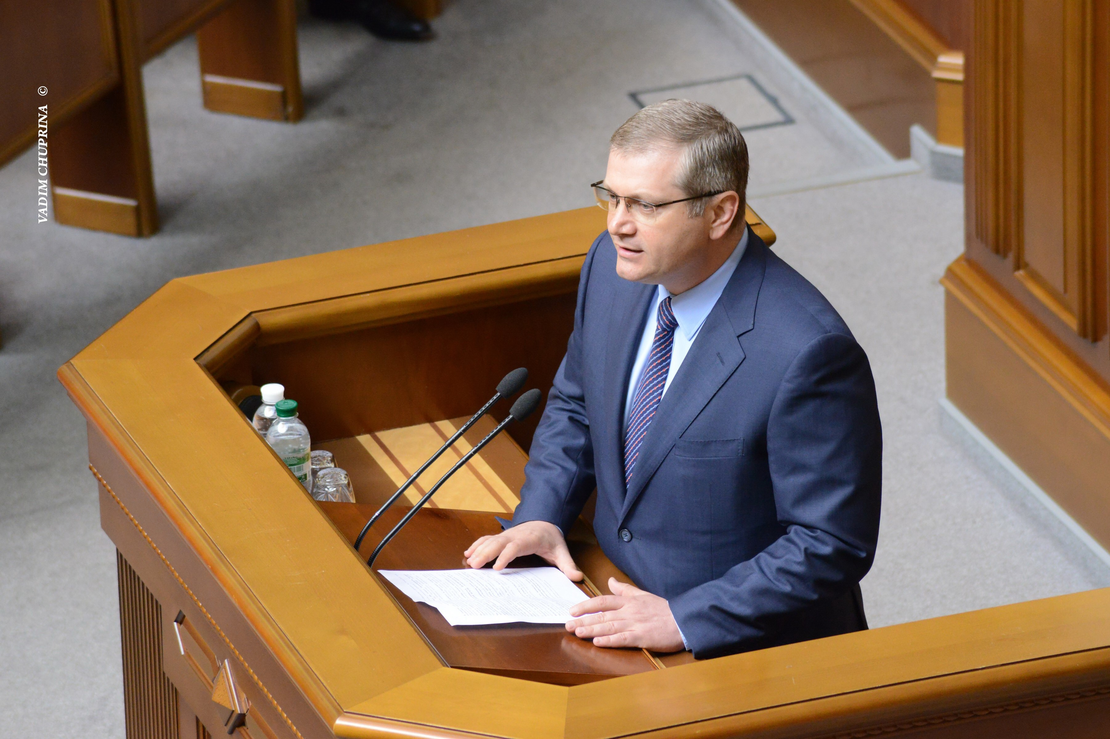 ВЕРХОВНА РАДА УКРАЇНИ 2015 фотограф Вадим Чуприна